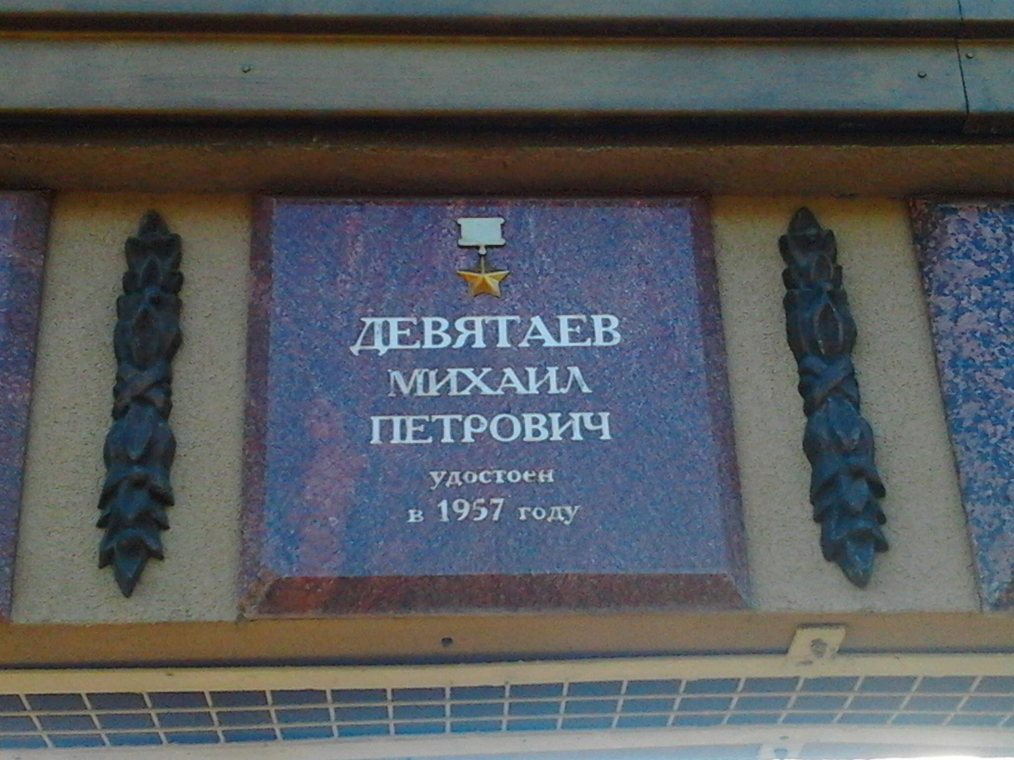 Мраморная табличка на пантеоне в Парке Победы г.Казани